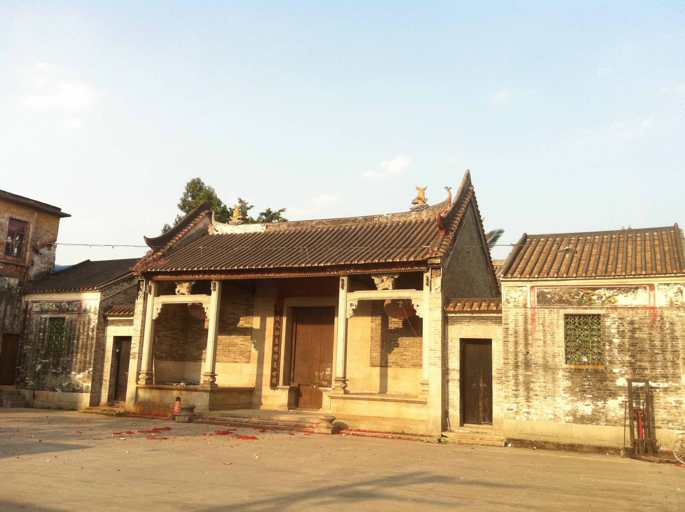 中文（香港）: 觀蔭李公祠，攝於2014年大年初一黃昏。